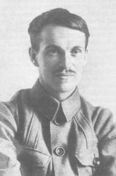 Нумеров Борис Васильевич, советский астроном (1891-1941)